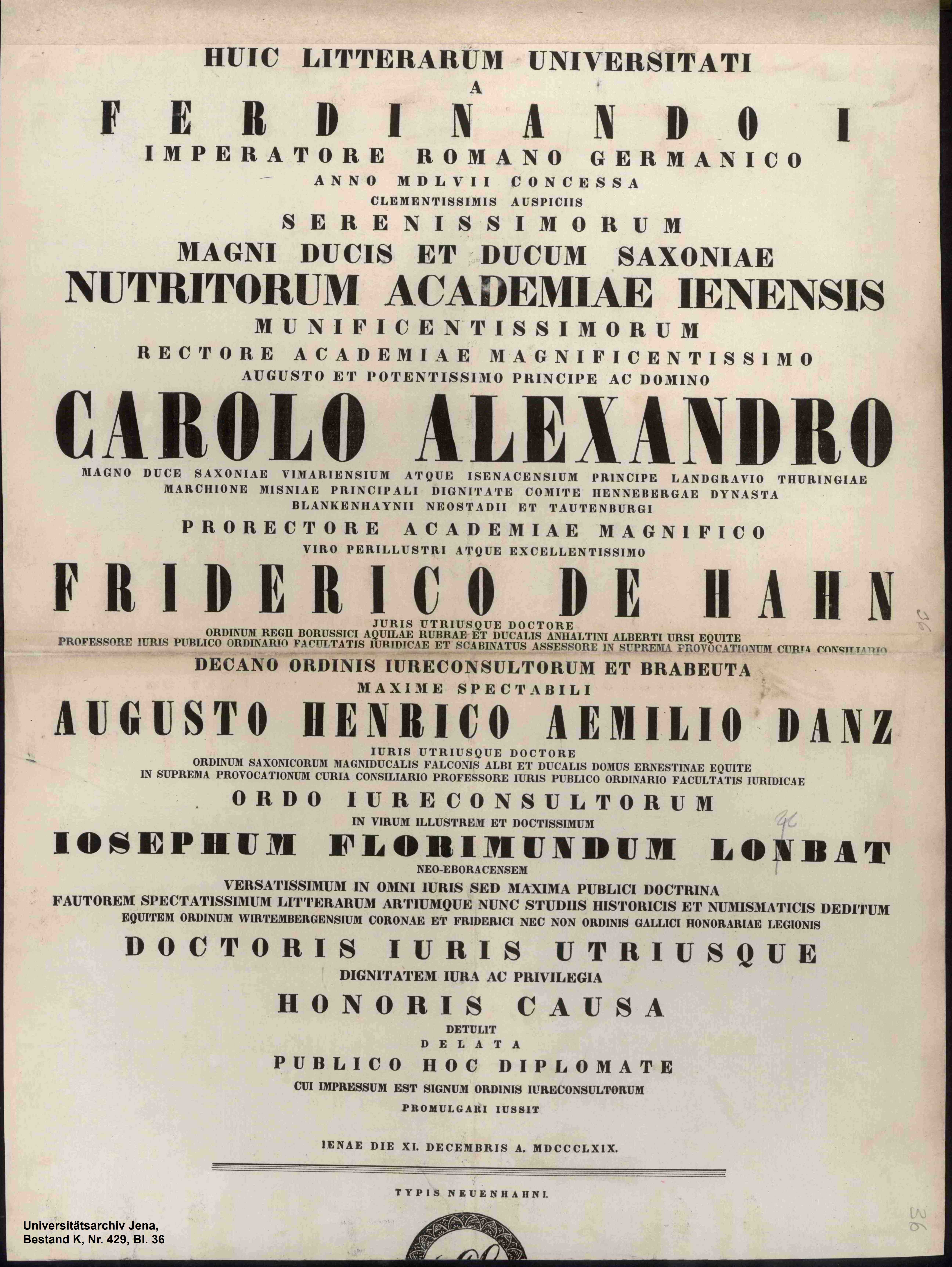 Urkunde zur Verleihung der Ehrendoktorwürde als Dr. iur. utr. h. c. an Joseph Florimond Loubat